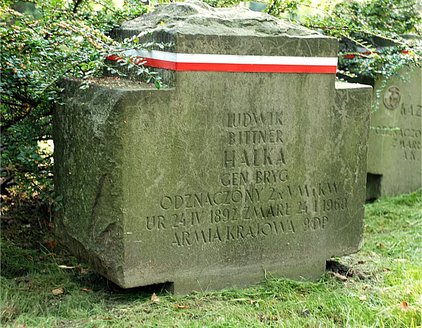 Ludwik Bittner - grób na Powązkach Wojskowych w Warszawie